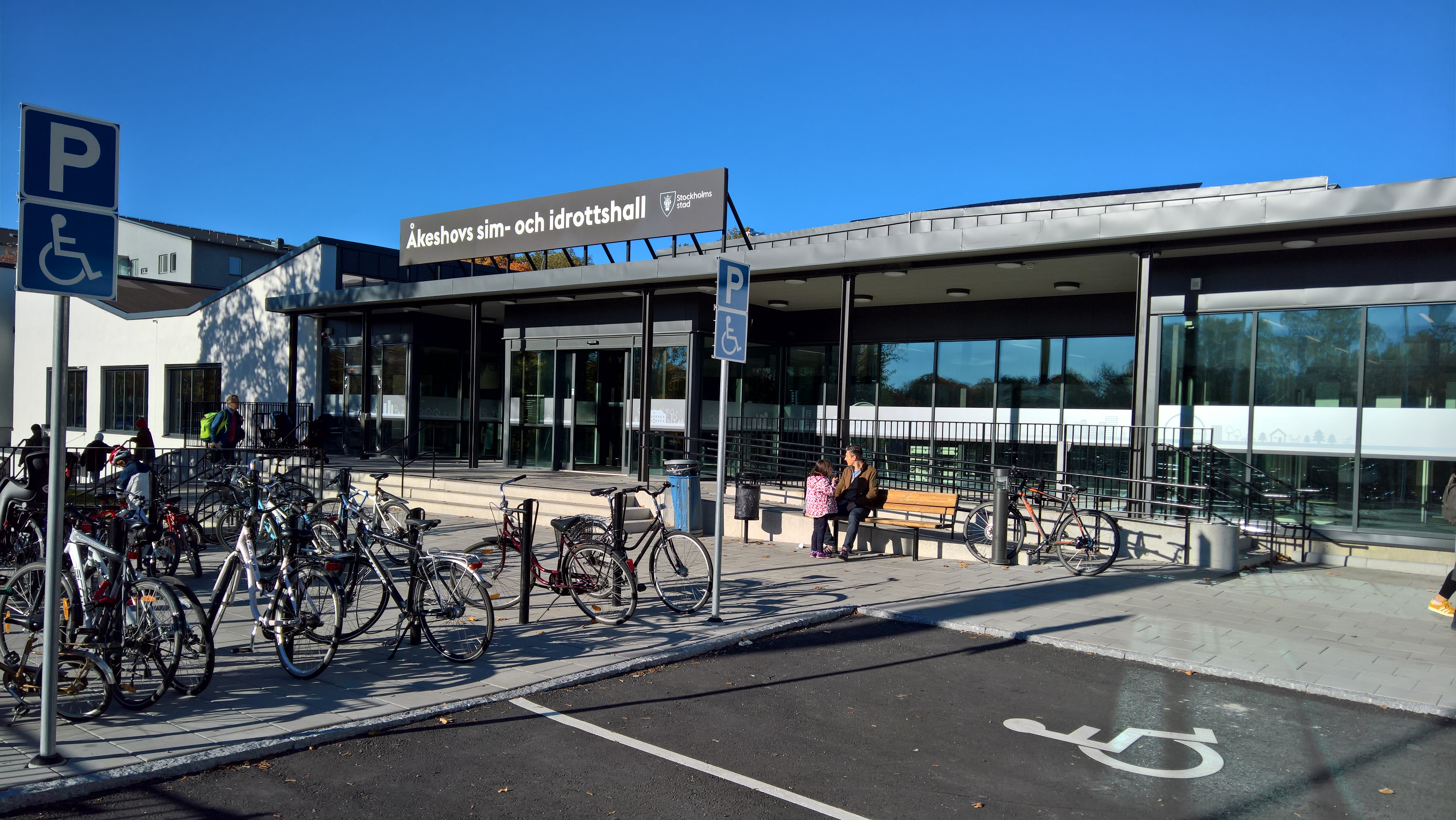 Åkeshovin uima- ja liikuntahallin pääsisäänkäynti peruskorjauksen jälkeen